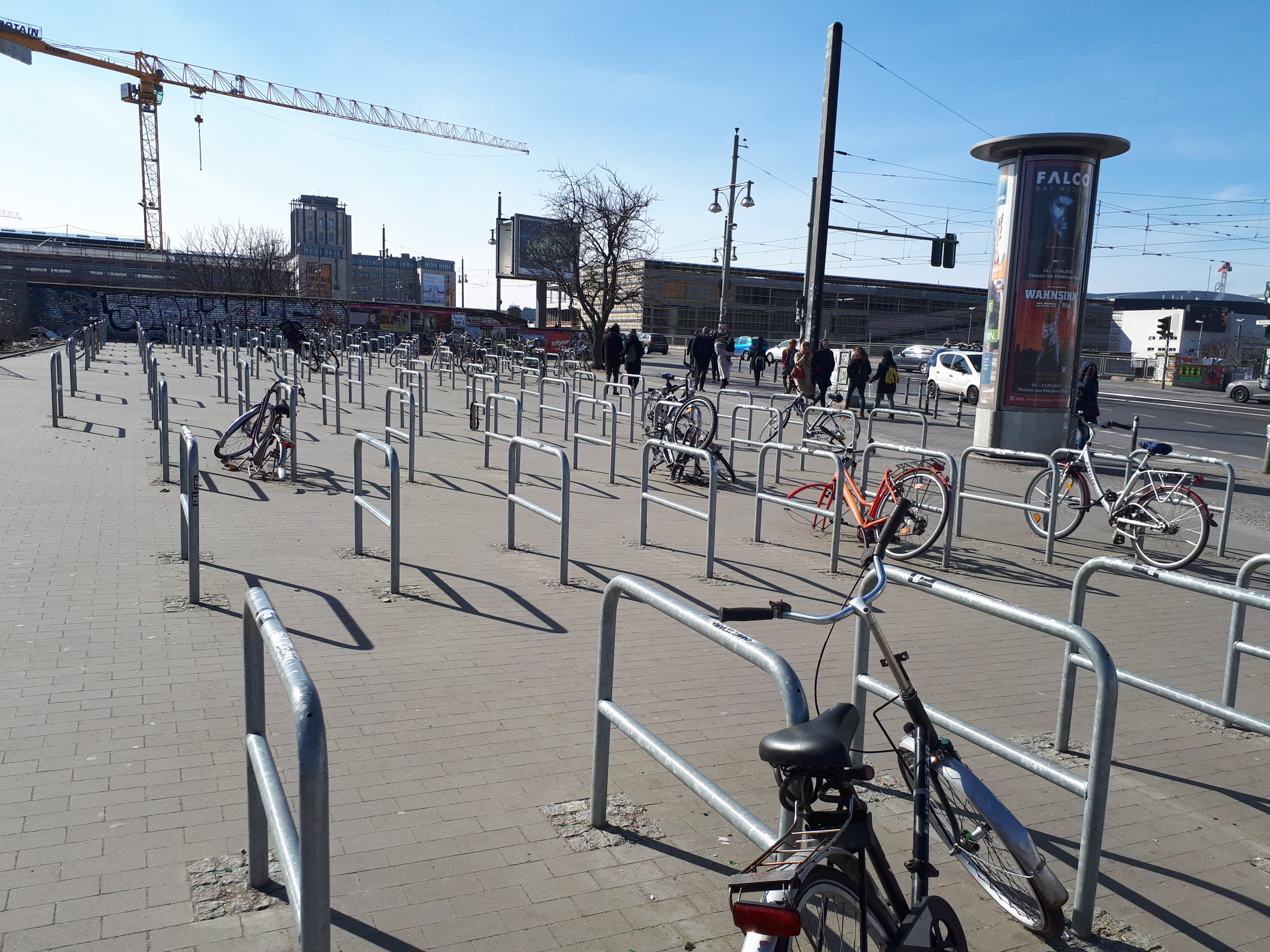 Friedrichshain Warschauer Straße Fahrradparkplatz mit Kreuzberger Bügeln